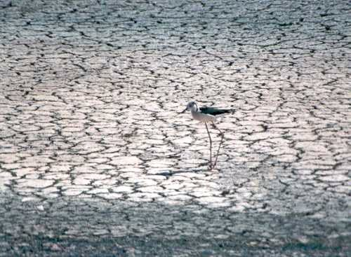 "Les Goles". Castellón (Comunidad Valenciana) España. Almassora. (provincia de Castellón). "Les Goles". Esta imagen cuenta con el consentimiento de la Federación Valenciana de Municipios y Provincias para su difusión. Usuario : Pelayo2 Ver Wikipedia:Autorización de copia de web/Federación Valenciana de Municipios y Provincias